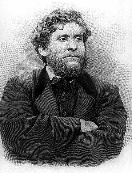 Jean Jaurès, gravure d'après une photographie prise par Pierre Petit (1831-1909) de la Section des lettres de l'École normale supérieure, entre 1878 et 1881.